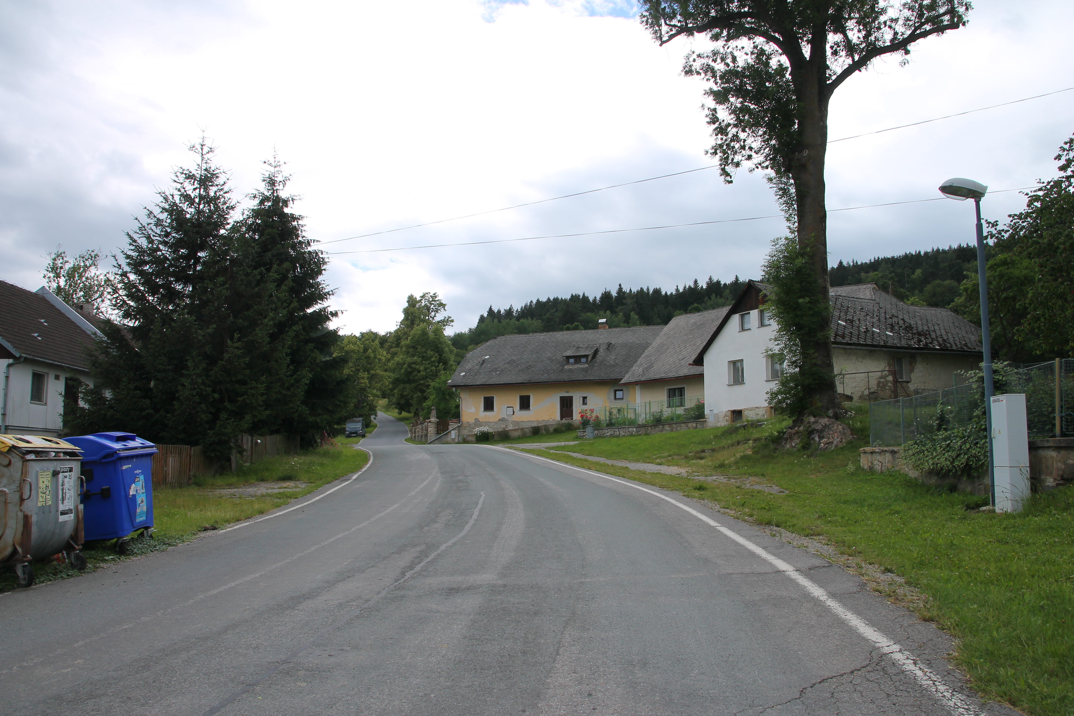 Silnice a chalupy v Račově